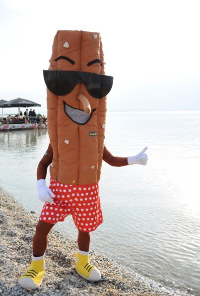 Joe Soletti am Ostufer des Neusiedler Sees im nördlichen Burgenland (Podersdorf am See) am 30. April 2011 während des Surf Worldcup 2011